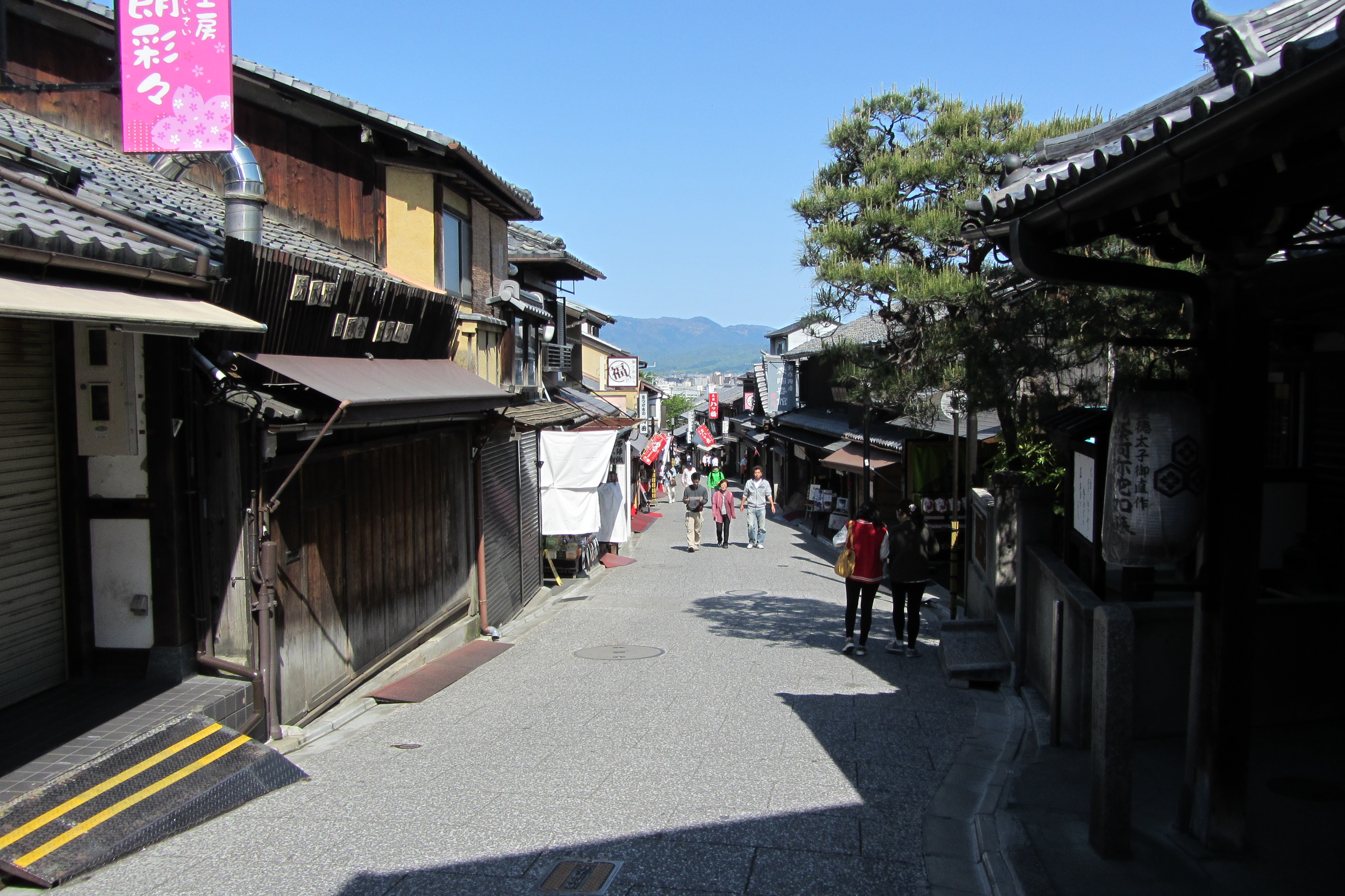 kiyomizuzaka, kyoto